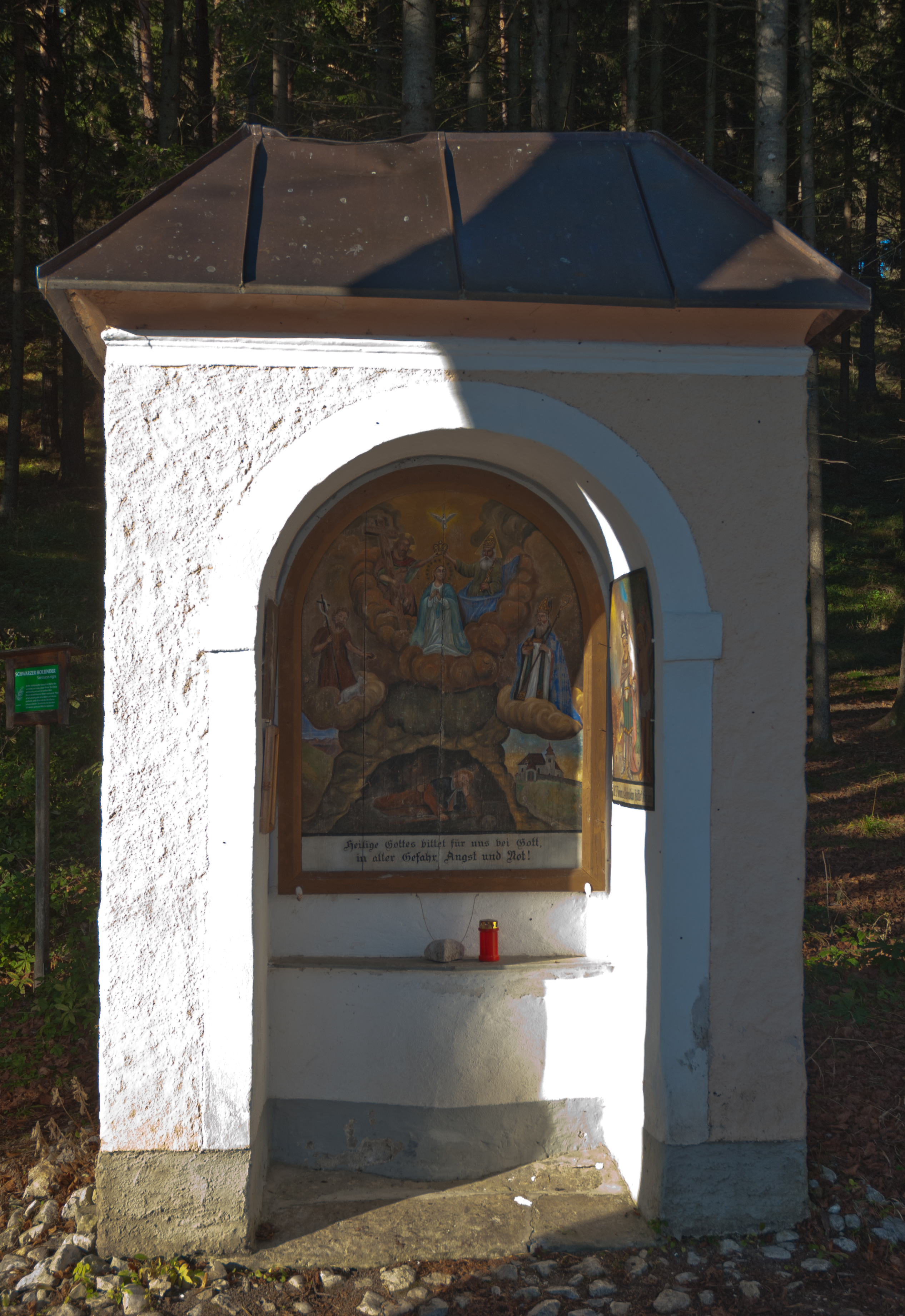 Kapelle am Weg zum Heiligenstein in Gaflenz, dargestellt sind unter anderem die Hll. Johannes der Täufer und Nikolaus, die Patrone der Pfarrkirche von Hollenstein an der Ybbs (Nachbarort in NÖ), die Kapelle wird auch von Hollenstein betreut